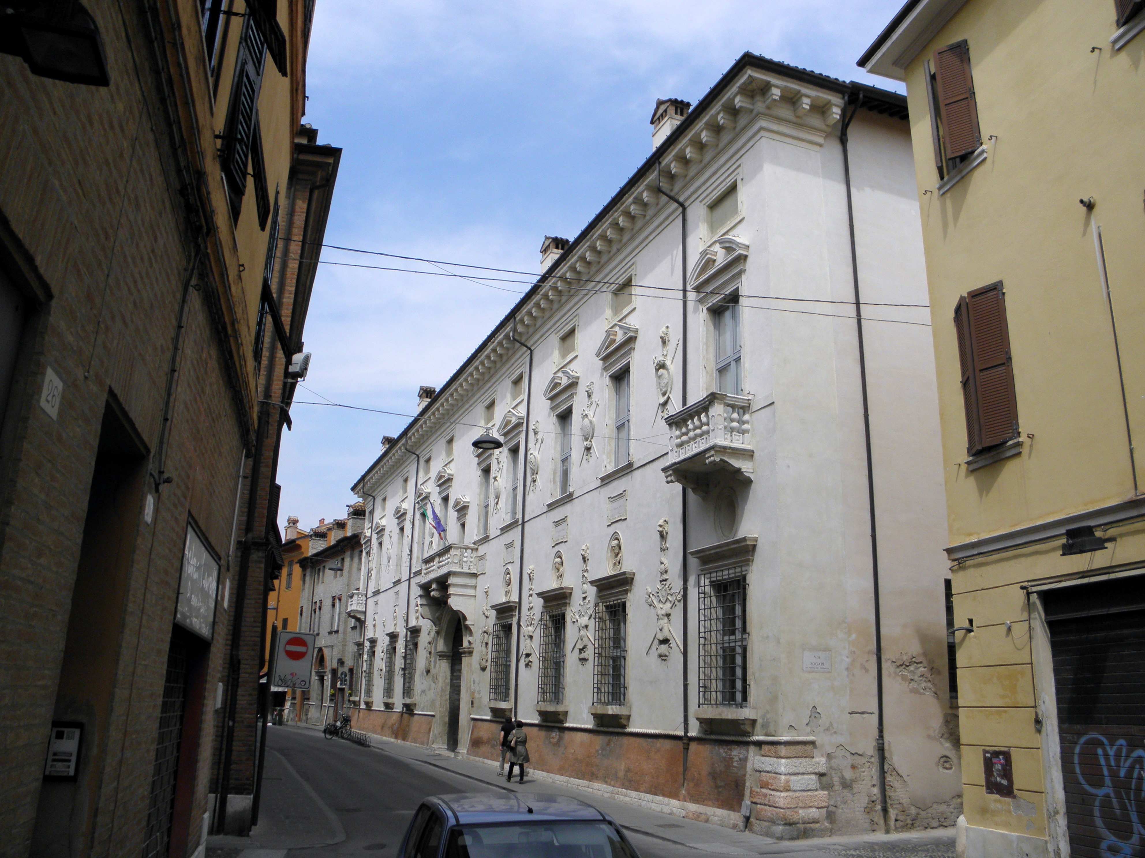 Ferrara, Palazzo Bevilacqua Costabili.